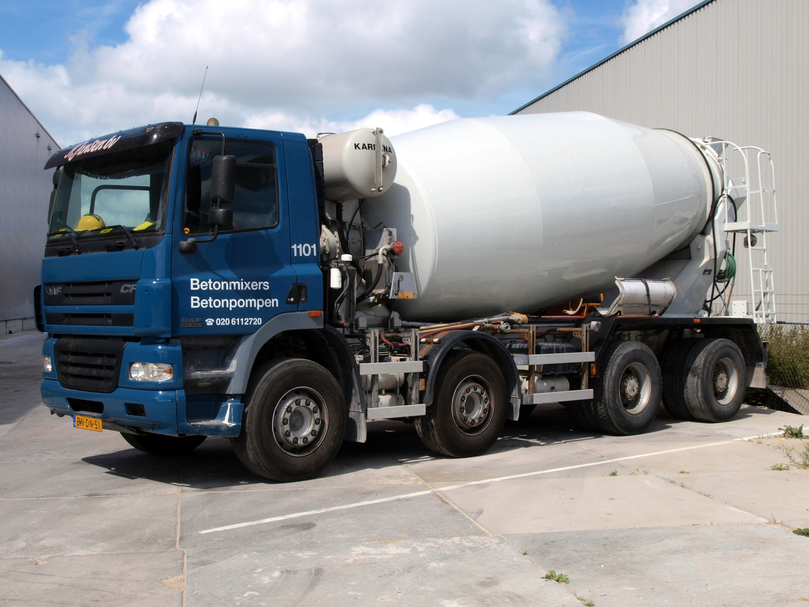 DAF 85 380